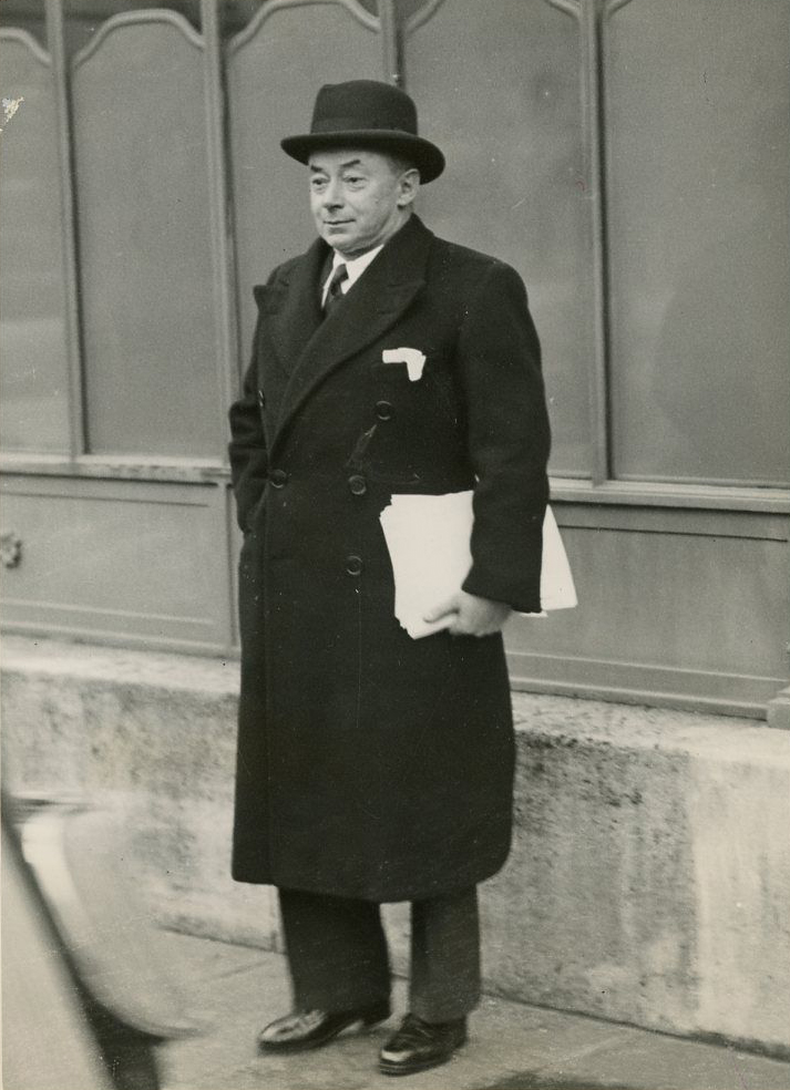 Paul Reynaud, ministre des Finances, quittant l'Élysée (1938).